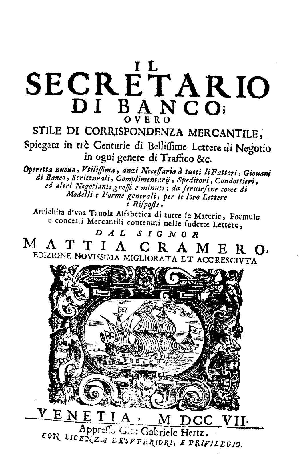 Frontespizio